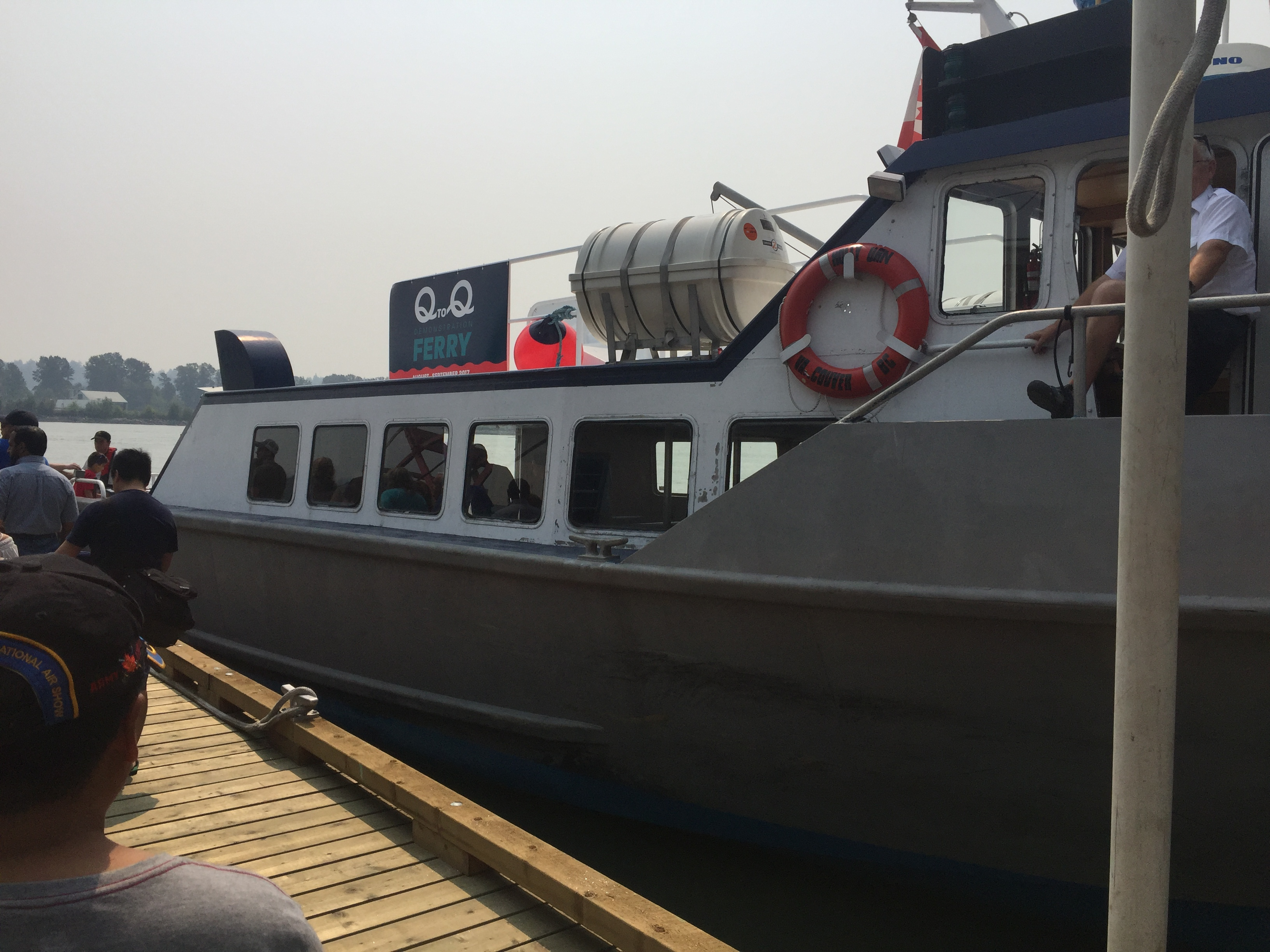 Traversier «QtoQ Demonstration Ferry» à Quayside, New Westminster, Colombie-Britannique, Canada. 粵語: 停泊喺加拿大卑詩省新西敏市碼頭區嘅「QtoQ示範渡輪」。